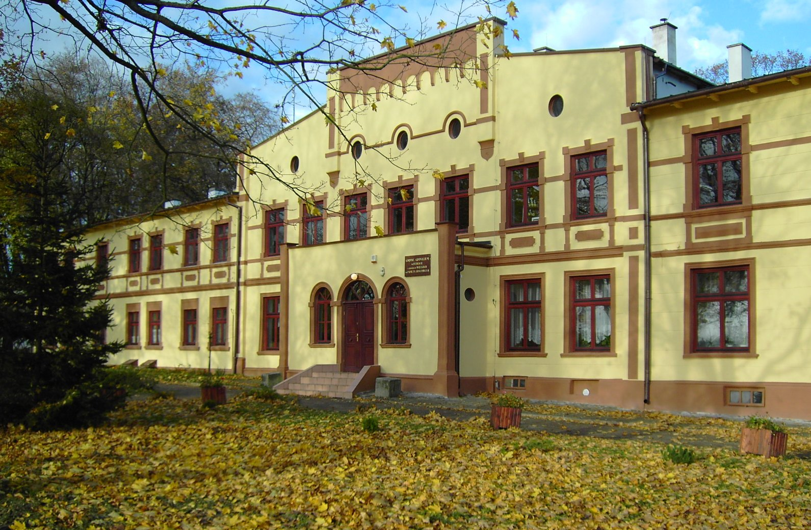 Pałac w Więckach.